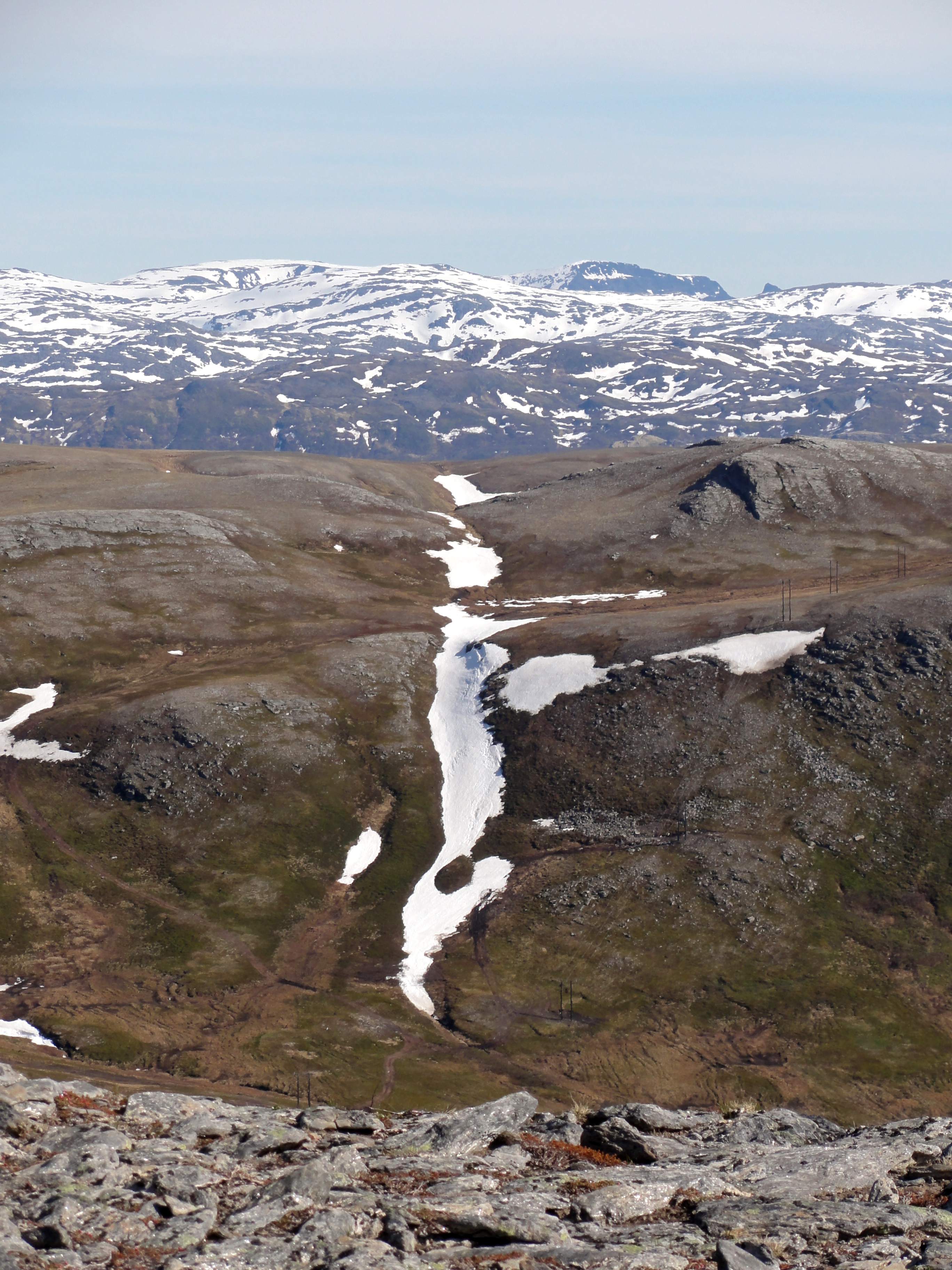 Sørøya, Nórsko, 2013